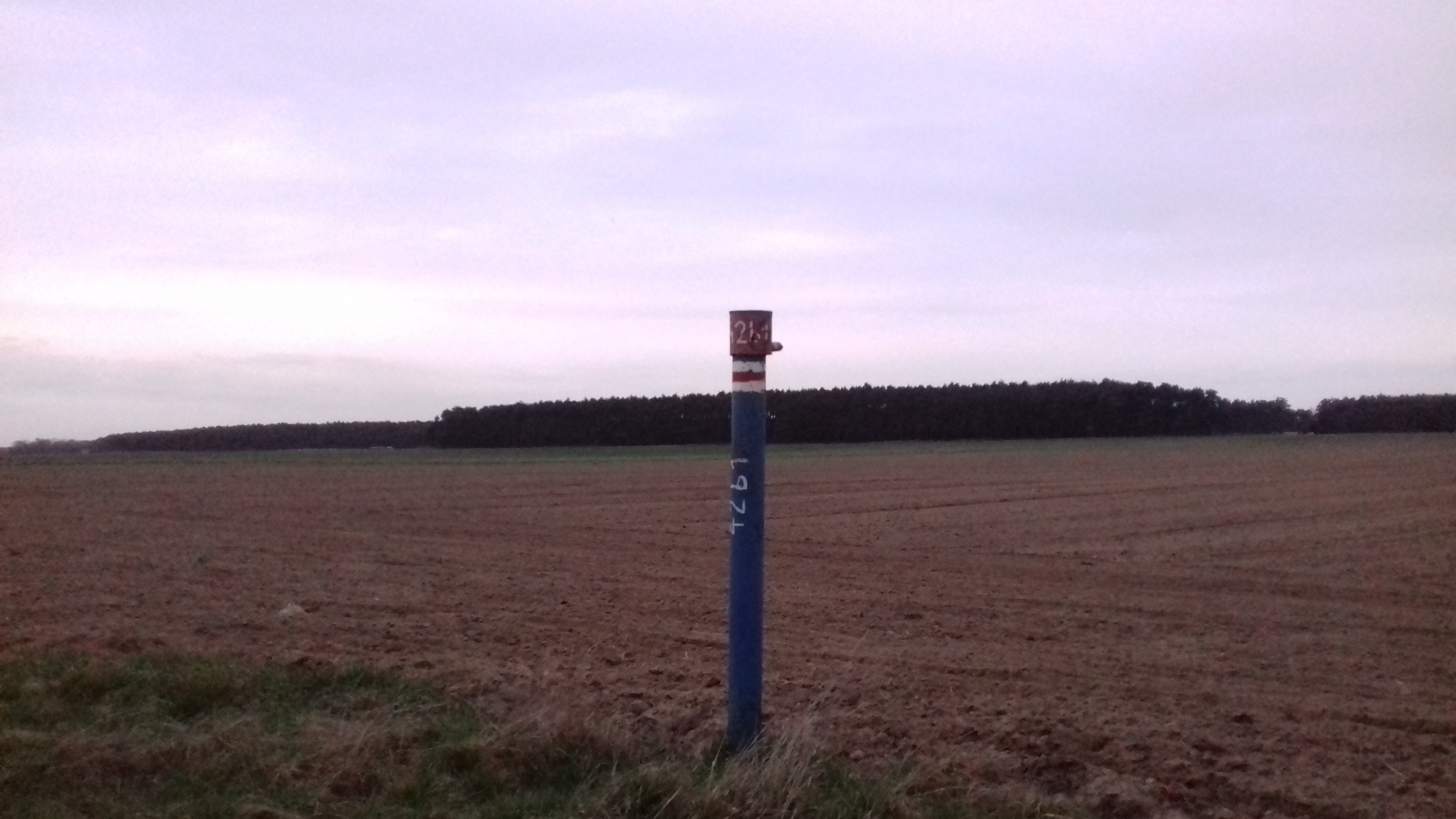 Krajobraz Rogalińskiego Parku Narodowego w okolicach Krajkowa - oznaczenie szlaku pieszego nr 3578